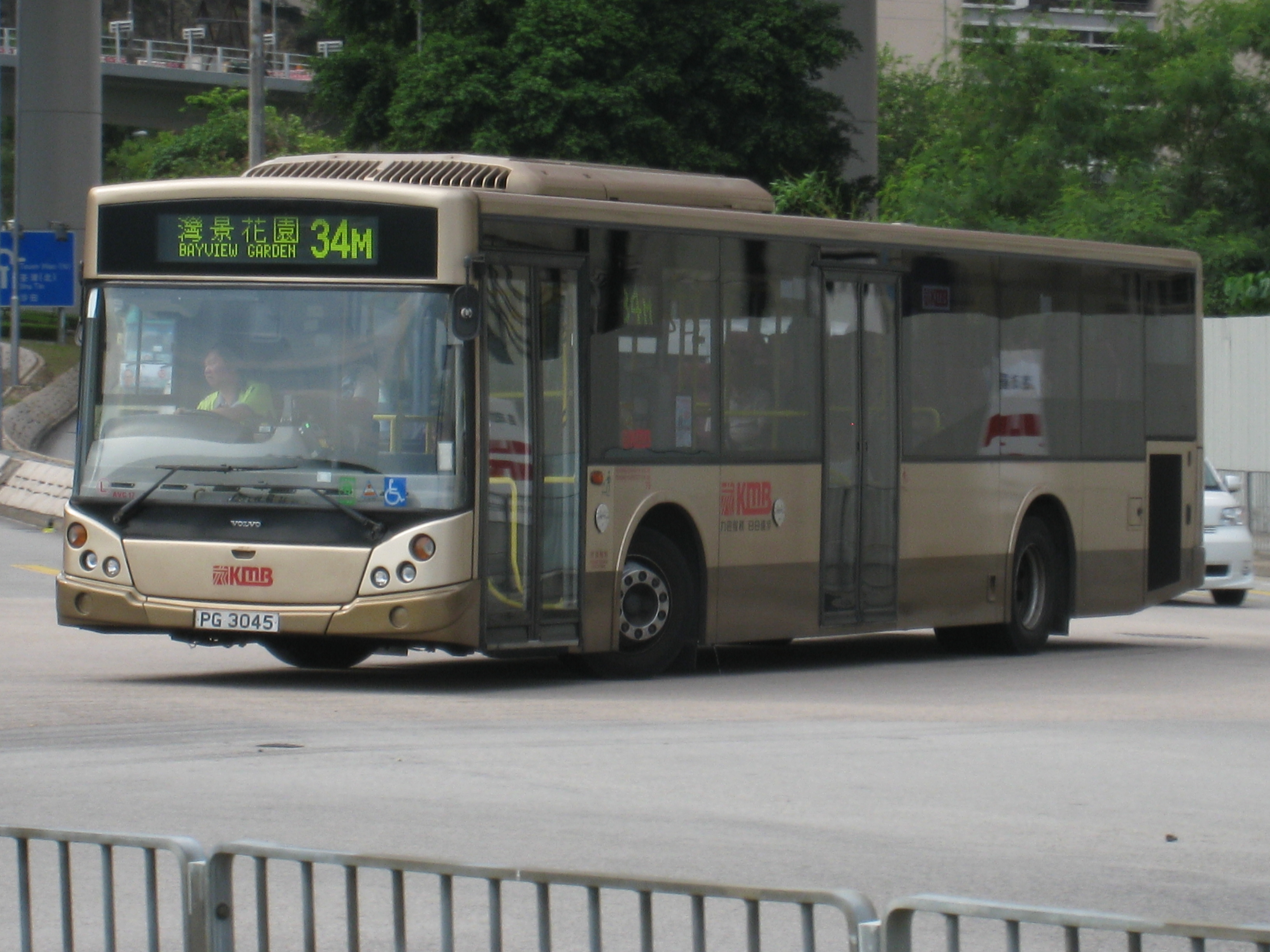 PG3045_AVC17 @ 34M